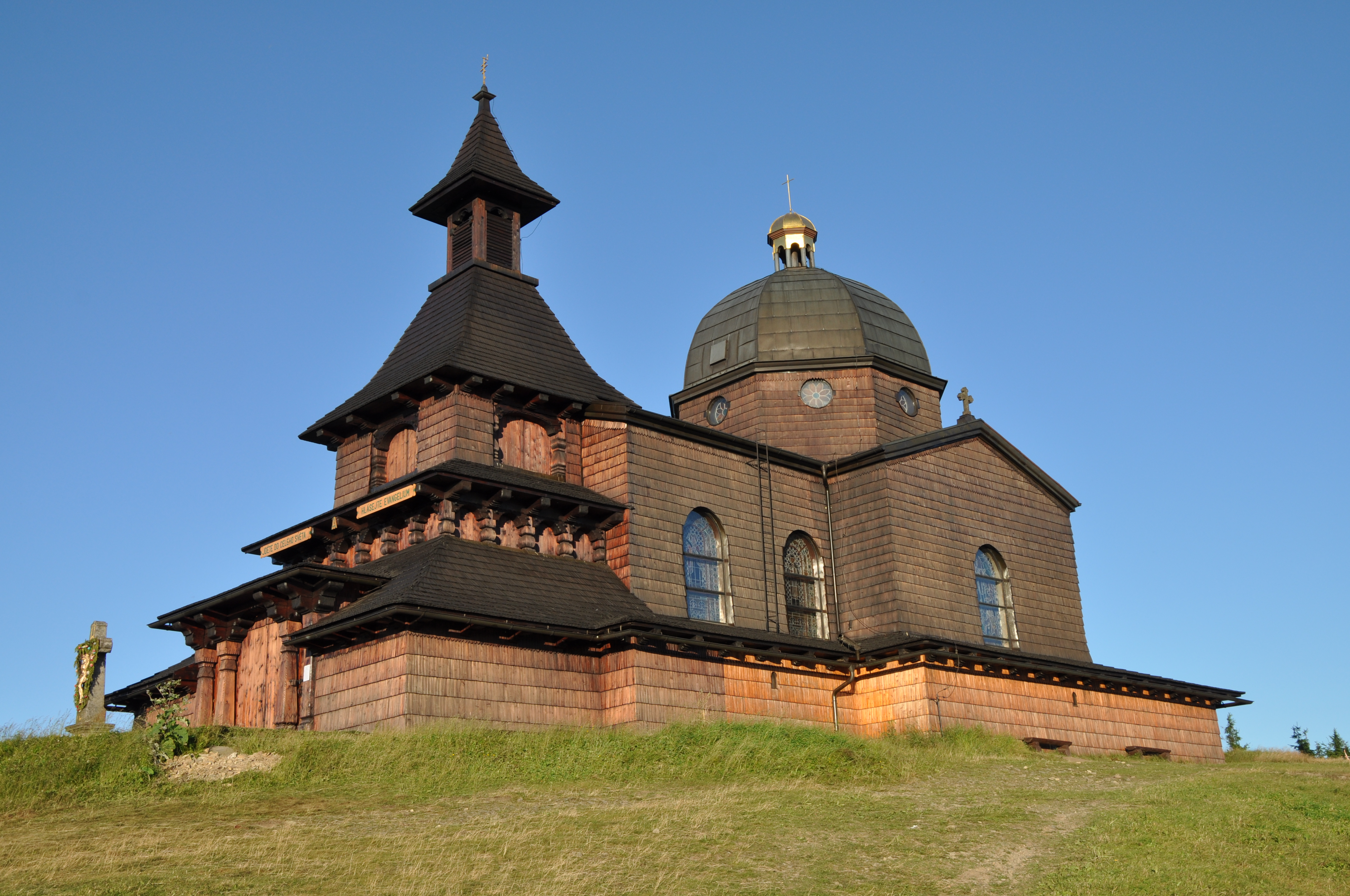 Kříž a kaple sv. Cyrila a Metoděje.Dolní Bečva.Okres Vsetín. Zlínský kraj.Czech Republic.